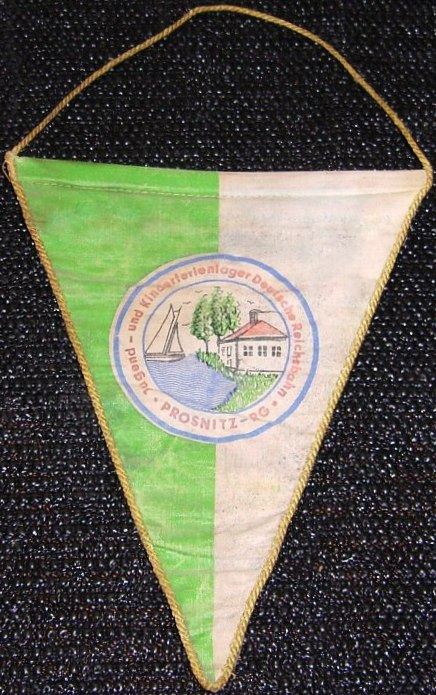 Wimpel des Jugend- und Kinderferienlagers der Deutschen Reichsbahn